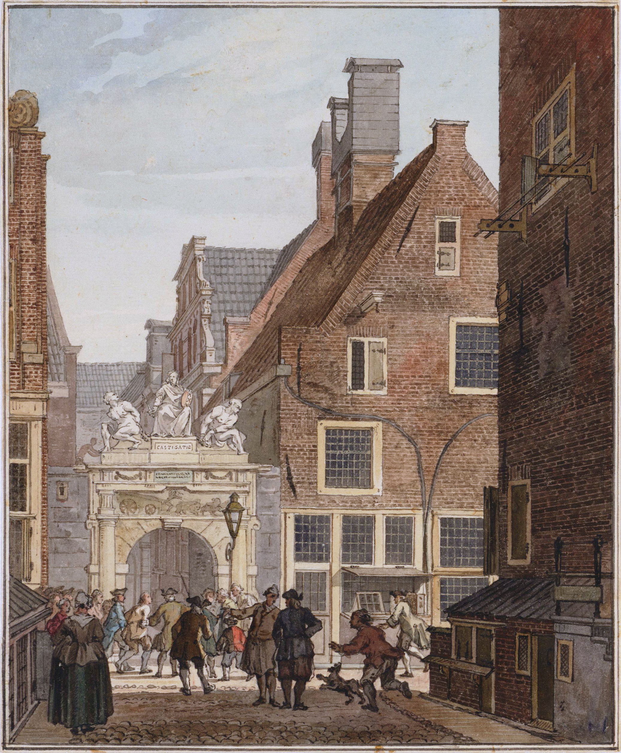 Poort van het Rasphuis, Reinier Vinkeles (1741-1816)